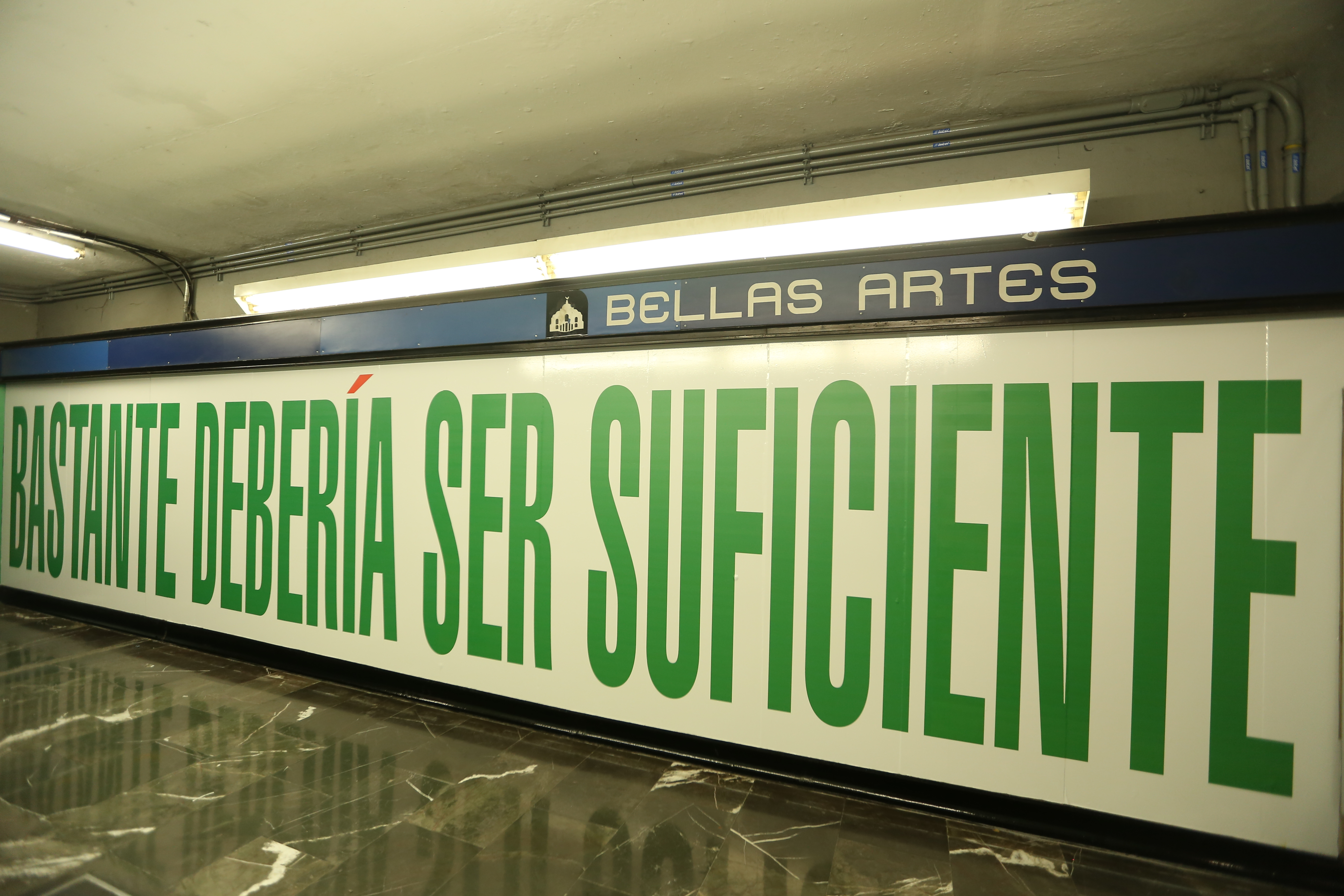 Empatía, exposición de Barbara Kruger en el Metro Bellas Artes, Ciudad de México